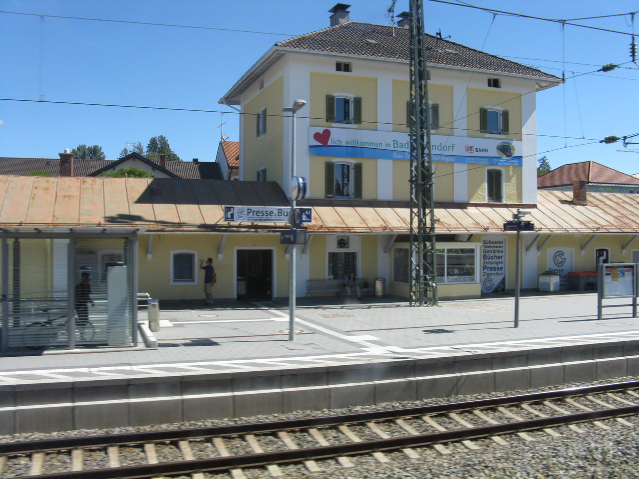 Bahnhofsgebäude von Bad Endorf